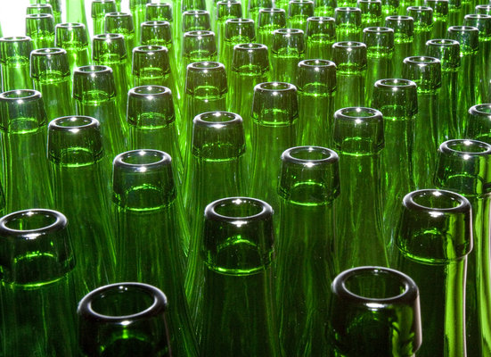 Sagardorako botilak.